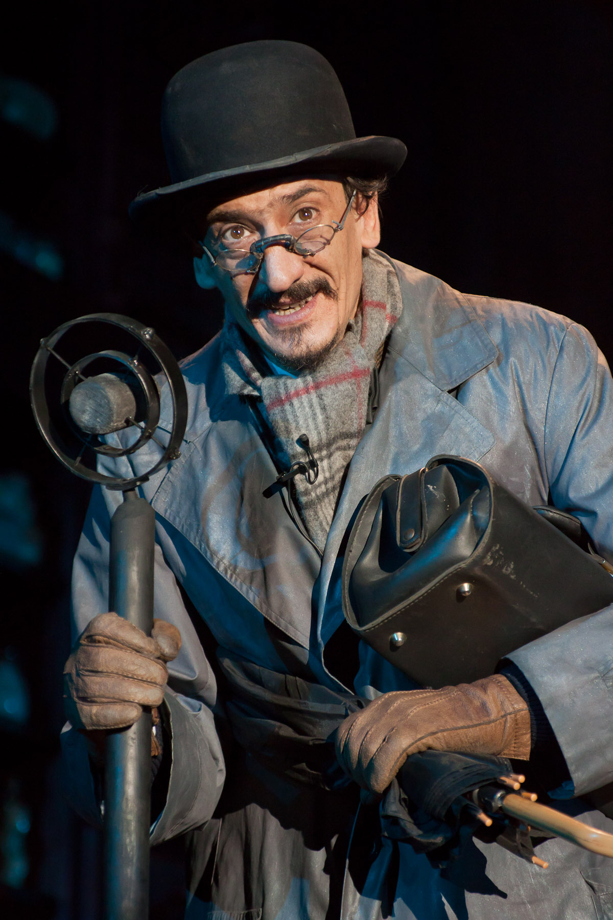 Pálffy Tibor az Illatszertár című előadásban. Sepsiszentgyörgy.